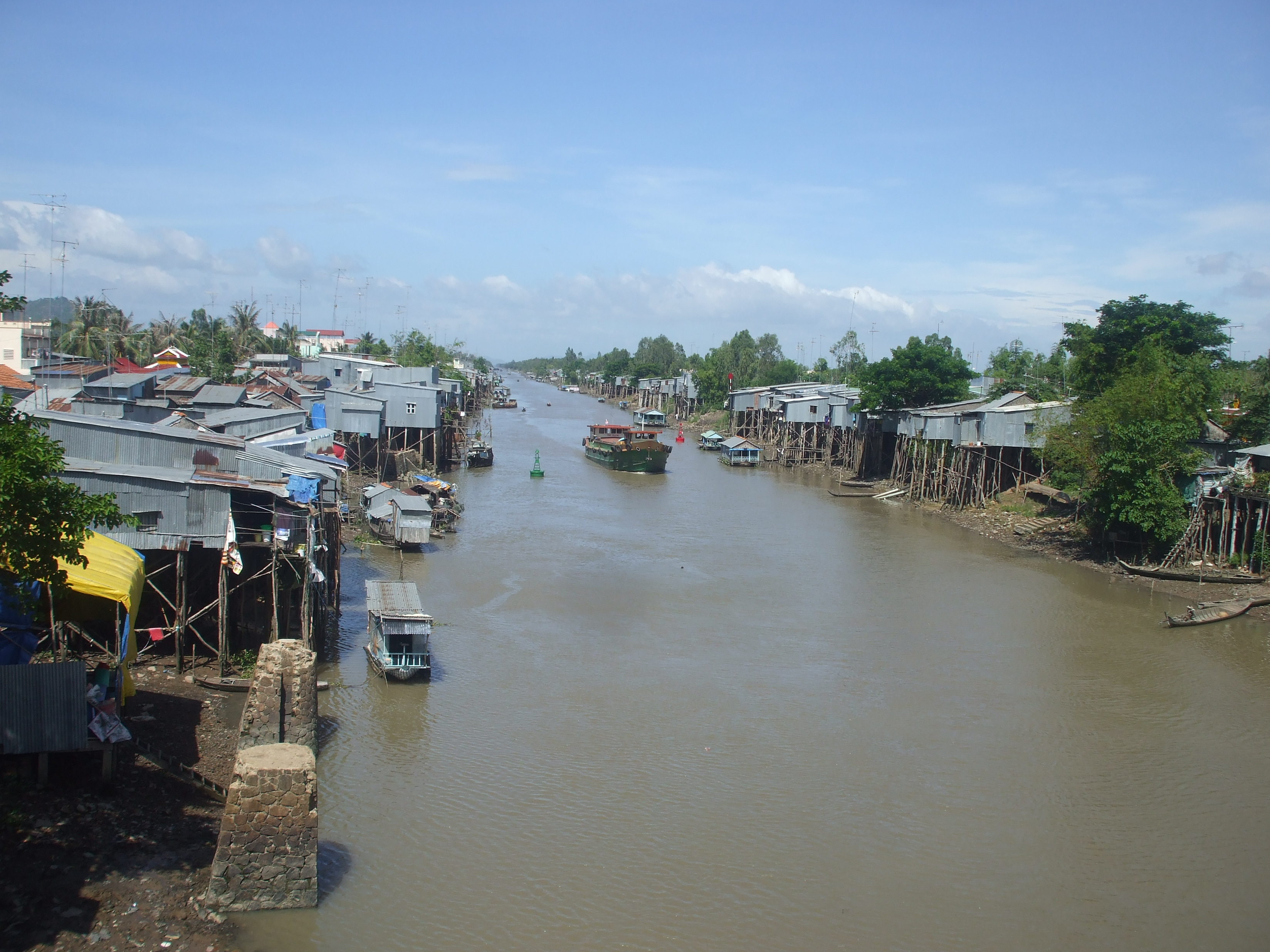 Kinh Vĩnh Tế, đoạn chảy qua cầu Vĩnh Ngươn, thuộc thị xã Châu Đốc, tỉnh An Giang.